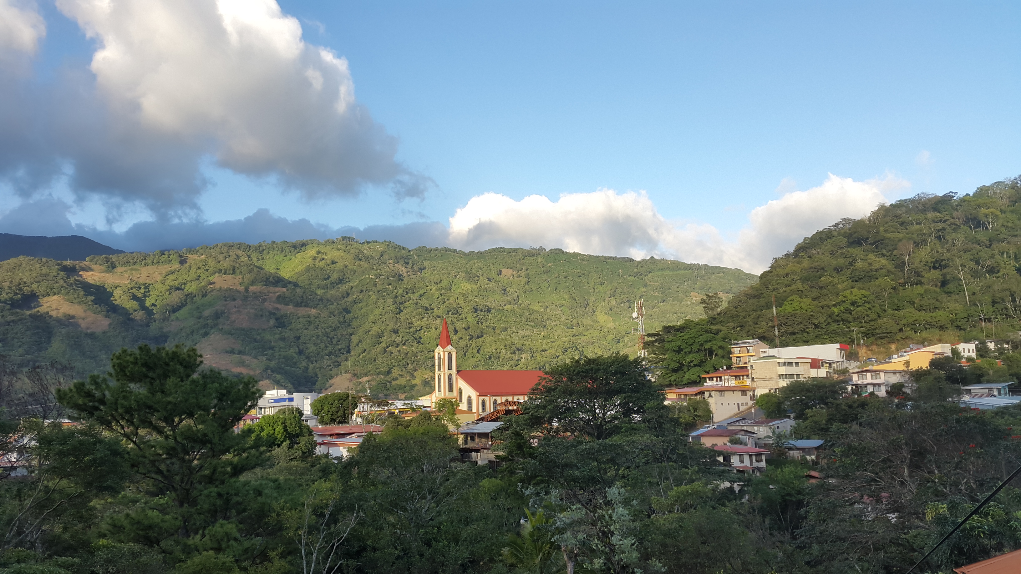 Vista de la ciudad de San Ignacio de Acosta, Costa Rica.